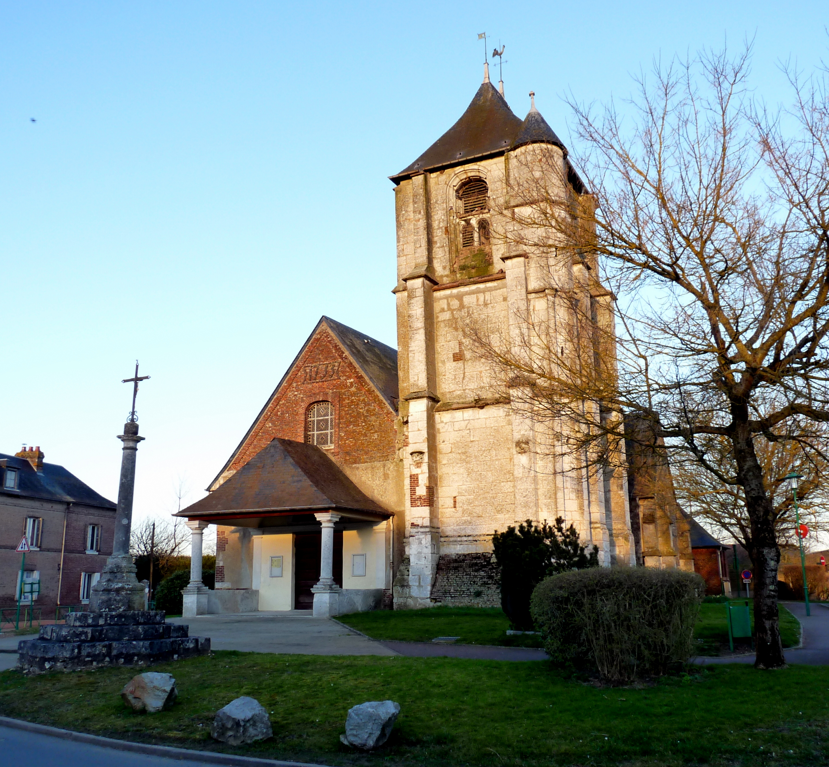 Église Saint-Ouen du Thuit-Signol et la croix monumentale, toutes deux classées au titre des monuments historiques.